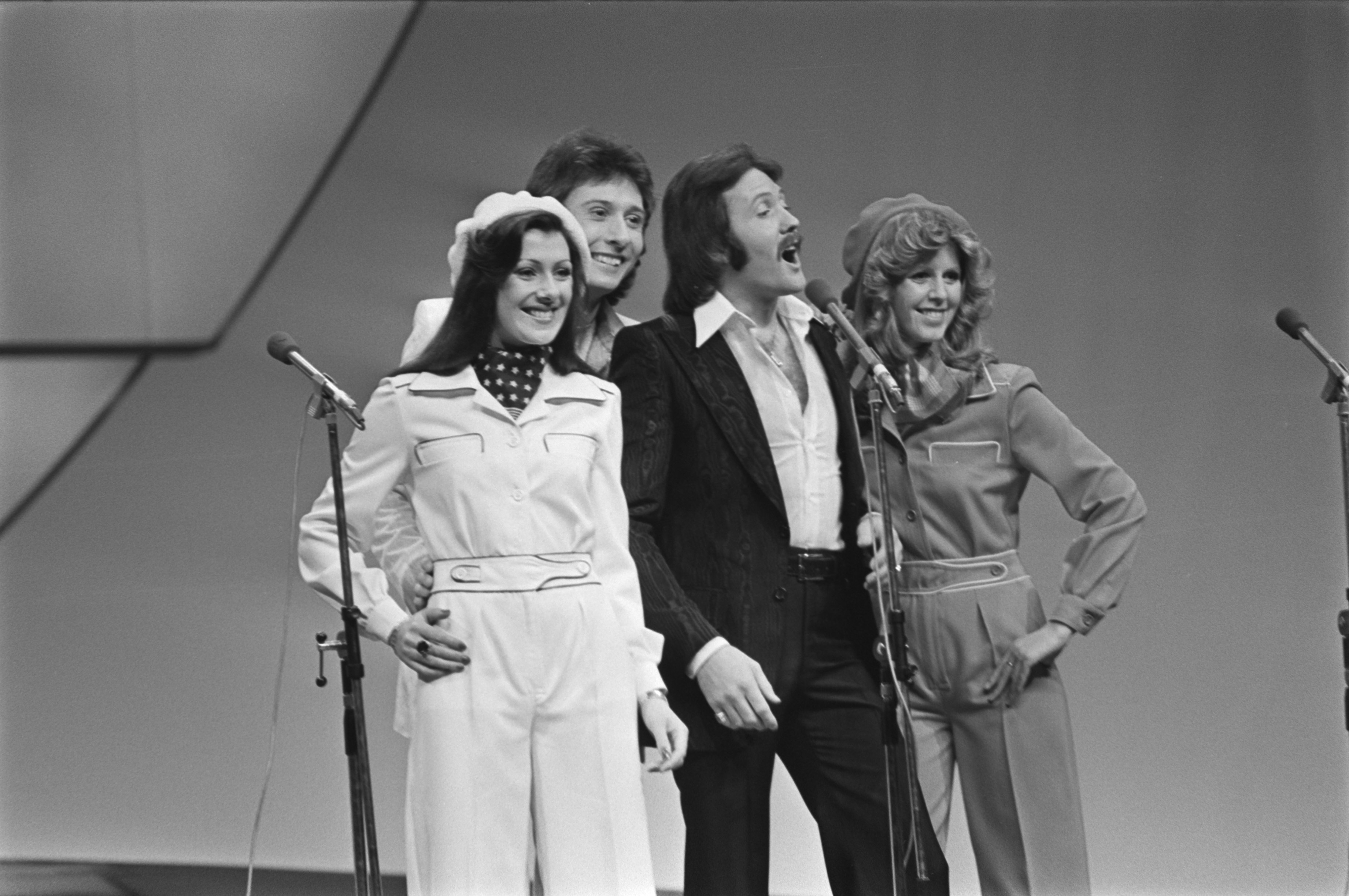 Collectie / Archief : Fotocollectie Anefo Reportage / Serie : [ onbekend ] Beschrijving : Eurovisie Songfestival 76 Den Haag ; Brotherhood of Man (Engeland) tijdens optreden Datum : 3 april 1976 Locatie : Den Haag, Groot-Brittannië Trefwoorden : songfestivals Persoonsnaam : Brotherhood of Man, Eurovisie Songfestival Fotograaf : Mieremet, Rob / Anefo Auteursrechthebbende : Nationaal Archief Materiaalsoort : Negatief (zwart/wit) Nummer archiefinventaris : bekijk toegang 2.24.01.05 Bestanddeelnummer : 928-5010